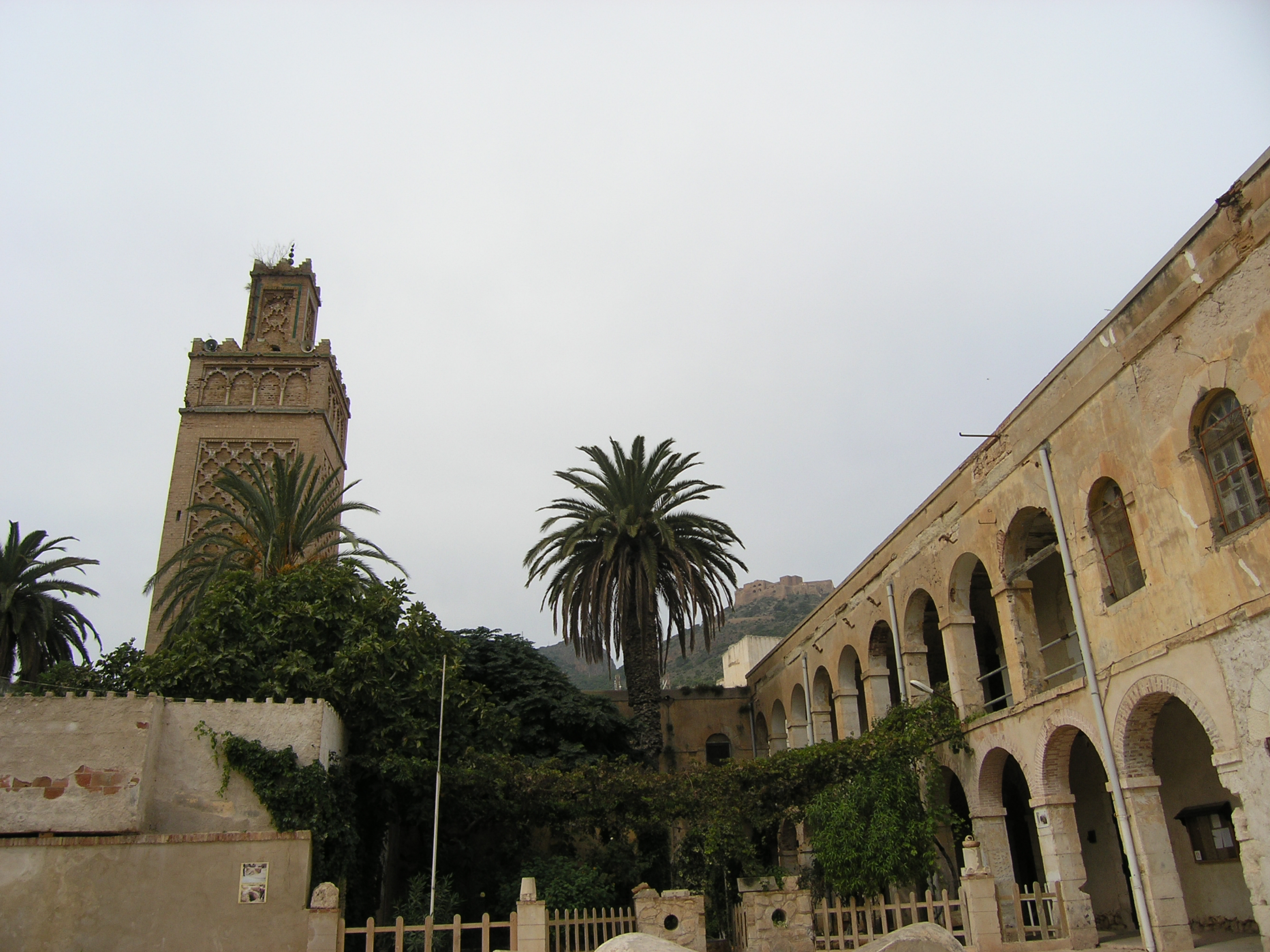 Minaret du campement Elém.de Mon.de Culte. (Oran)